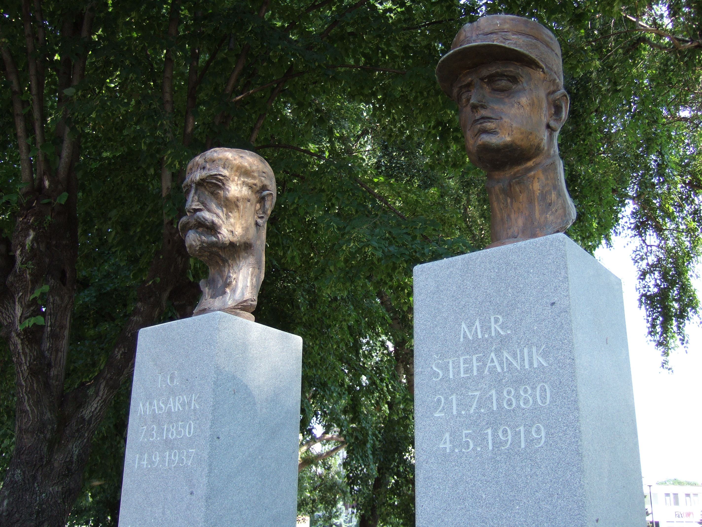 Monument of Masaryk and Štefánik in Košice, Slovakia